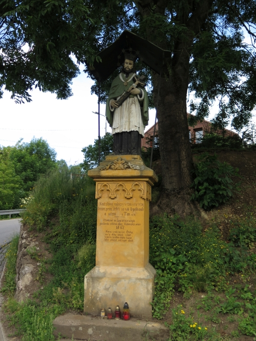 Socha svatého Jana Nepomuckého, Víchová nad Jizerou.